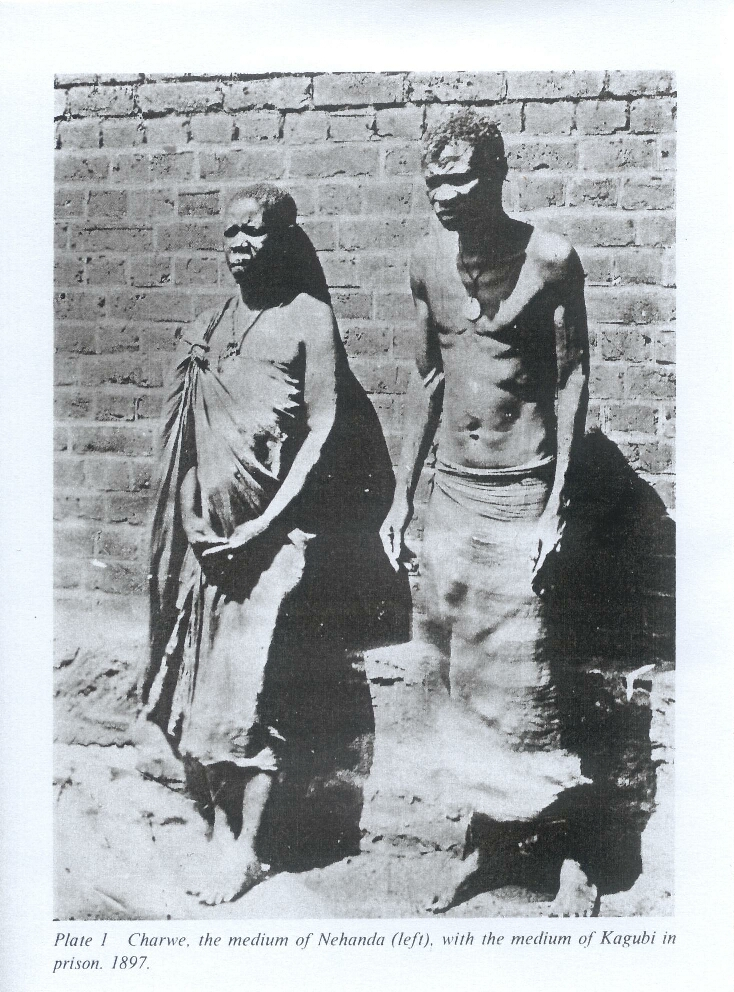 Nehanda Nyakasikana (à gauche) avec Sekuru Kaguvi, suite à leur capture